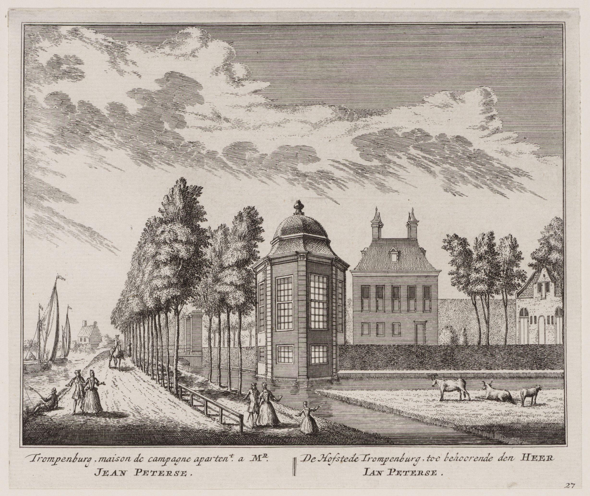 Beschrijving De Hofstede Trompenburg, toe behoorende den Heer Jan Peterse Amsteldijk gezien in zuidelijke richting. Rechts Hofstede Trompenburg, t.pl.v. huidige Amsteldijk 166. Techniek: ets. Documenttype prent Vervaardiger Rademaker, Abraham (1675-1735) Schenk, Leon (1696-1767) Collectie Collectie Atlas Dreesmann Datering 1730 Geografische naam Amsteldijk Inventarissen Afbeeldingsbestand 010094006041